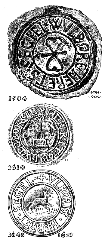 Ulfborg Herreds segl 1584,1610,1648, 1655